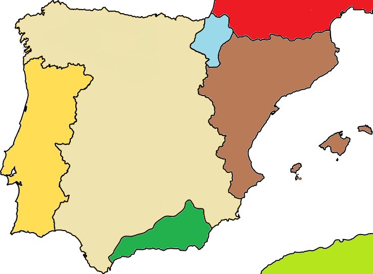 Mapa de la Península Ibèrica en 1400